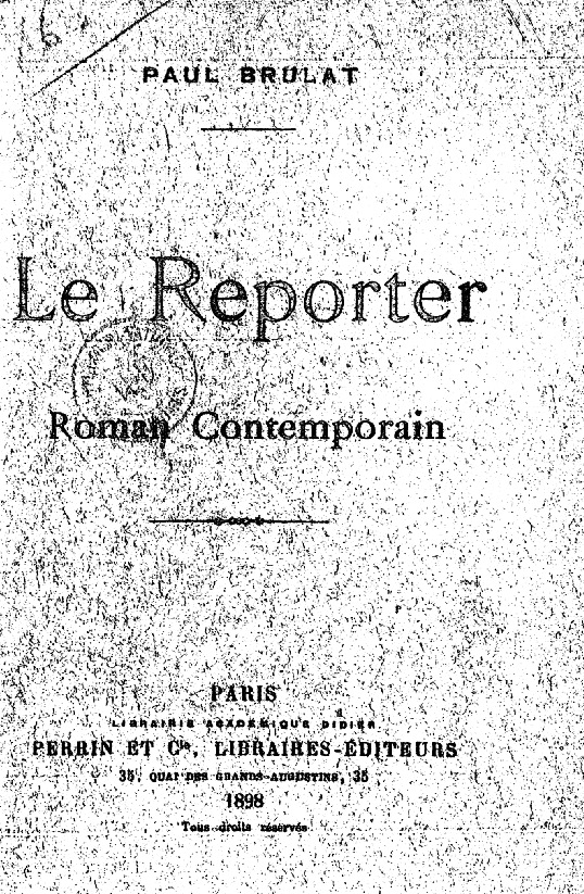 Paul Brulat, "Le Reporter, roman contemporain", éditeur Perrin, 1898, couverture.